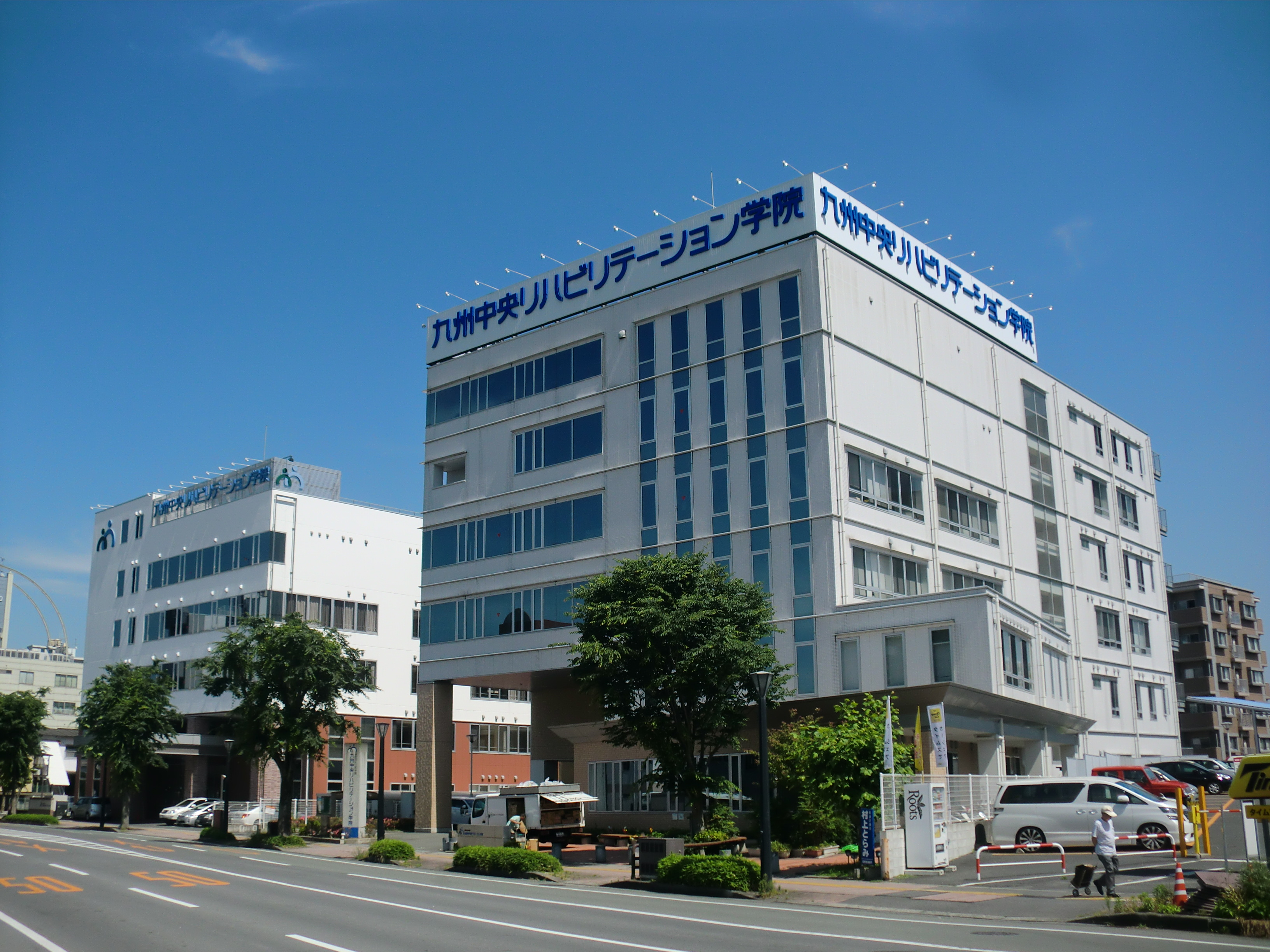 熊本市中央区にある九州中央リハビリテーション学院